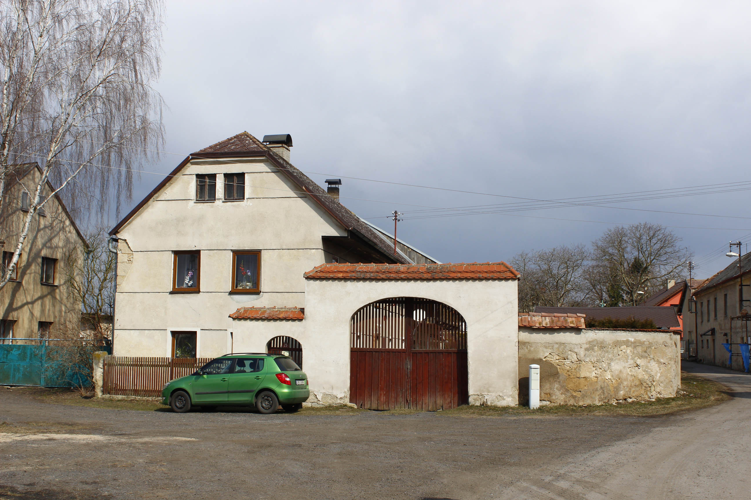 Dům číslo popisné 25 v Rokytovci.